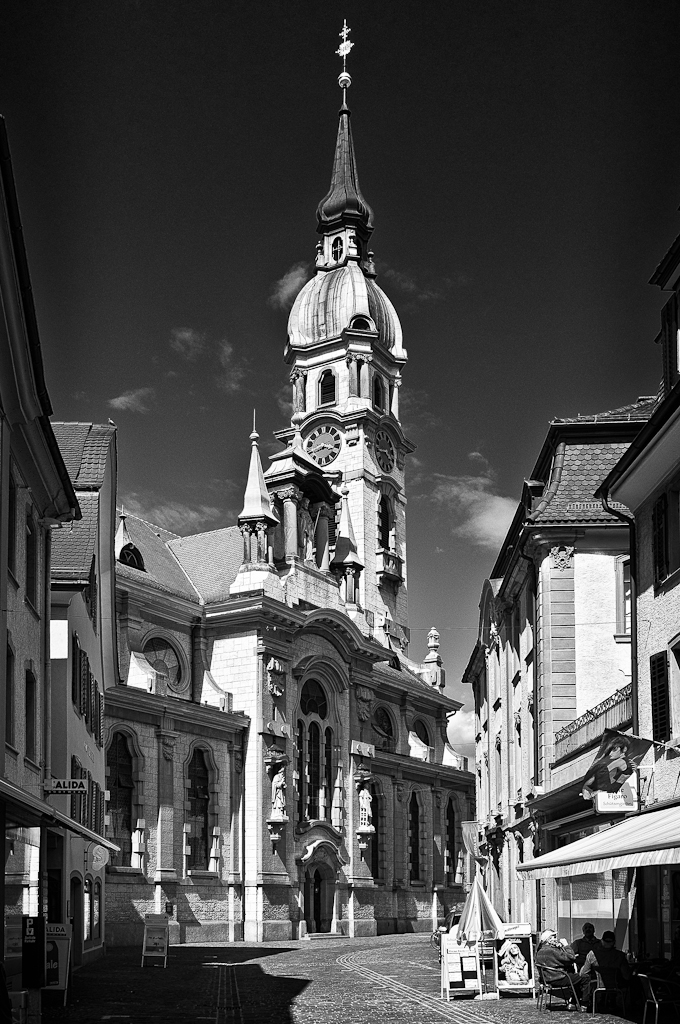 Katholische Stadtkirche St. Nikolaus in Frauenfeld, Kanton Thurgau, Schweiz